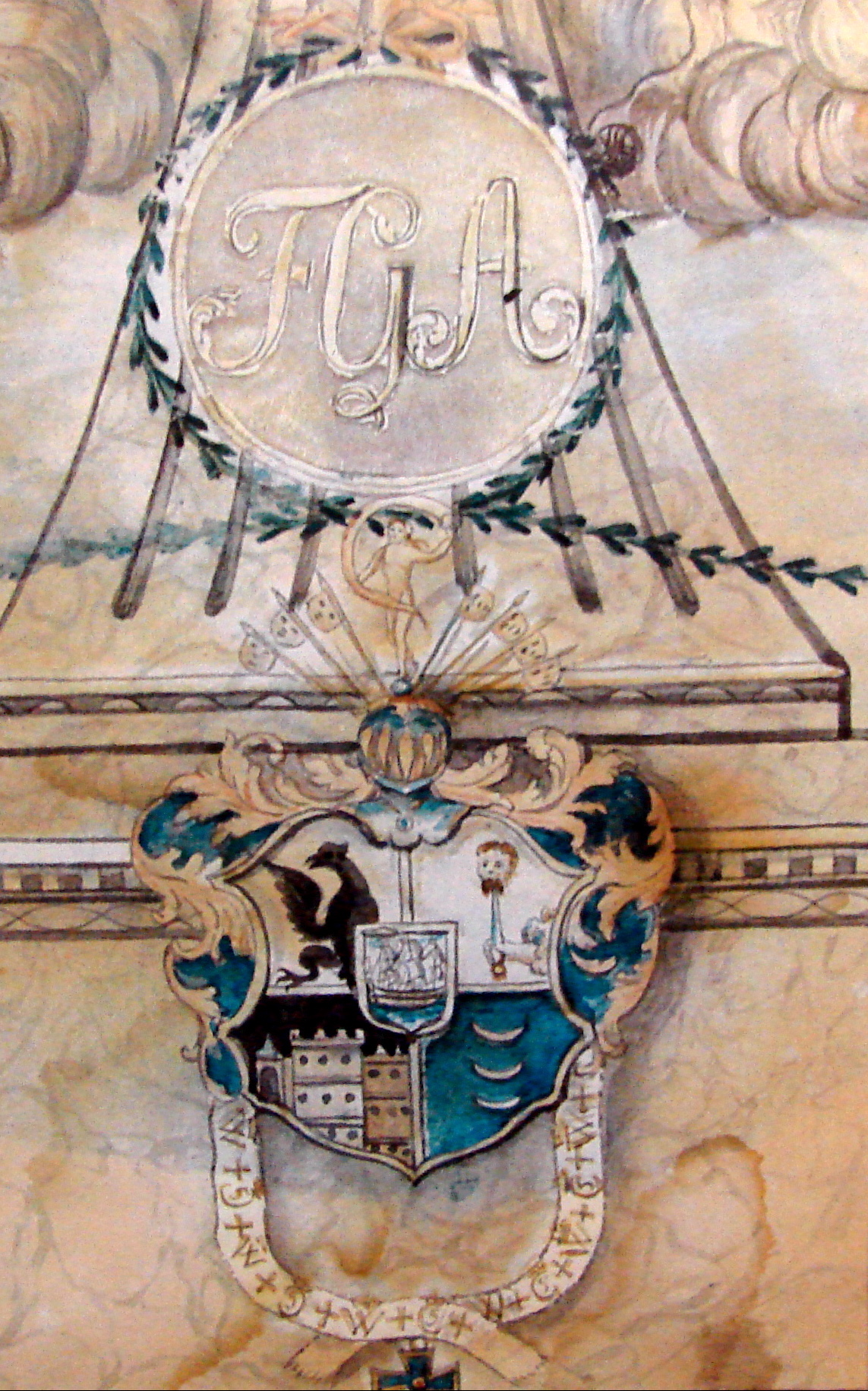 Adelers våben (detalje), Søndre Brekke Gård, Skien, Telemarken